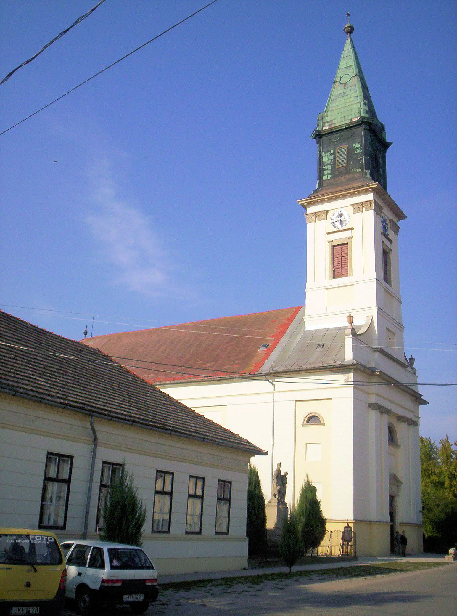 A kiskunlacházai református templom. Építette Peithüller József 1771 és 1772 között copf stílusban. – photo taken by uploader User:Csanády in 2006.